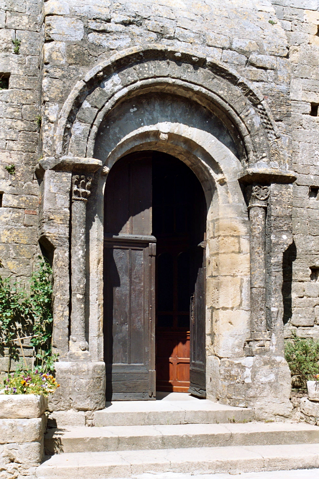 France - Languedoc - Aude - Église de l'Assomption de Notre-Dame de Baraigne